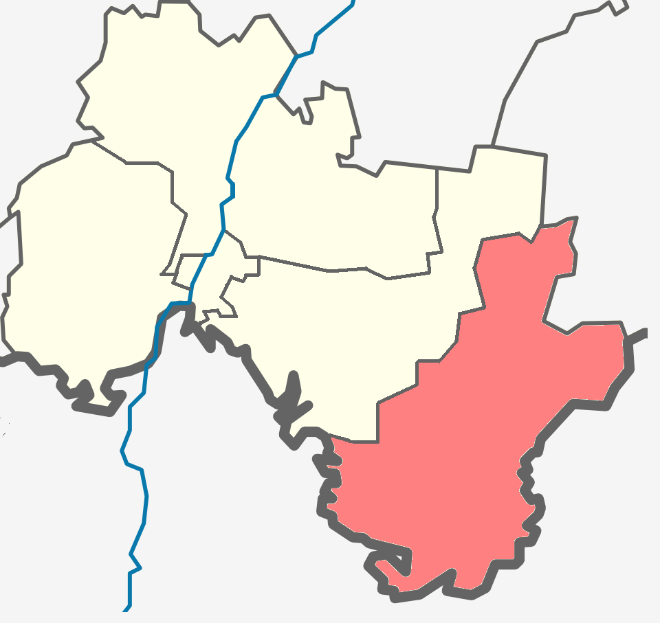 Будогощское ГП на карте Киришского района Ленинградской области